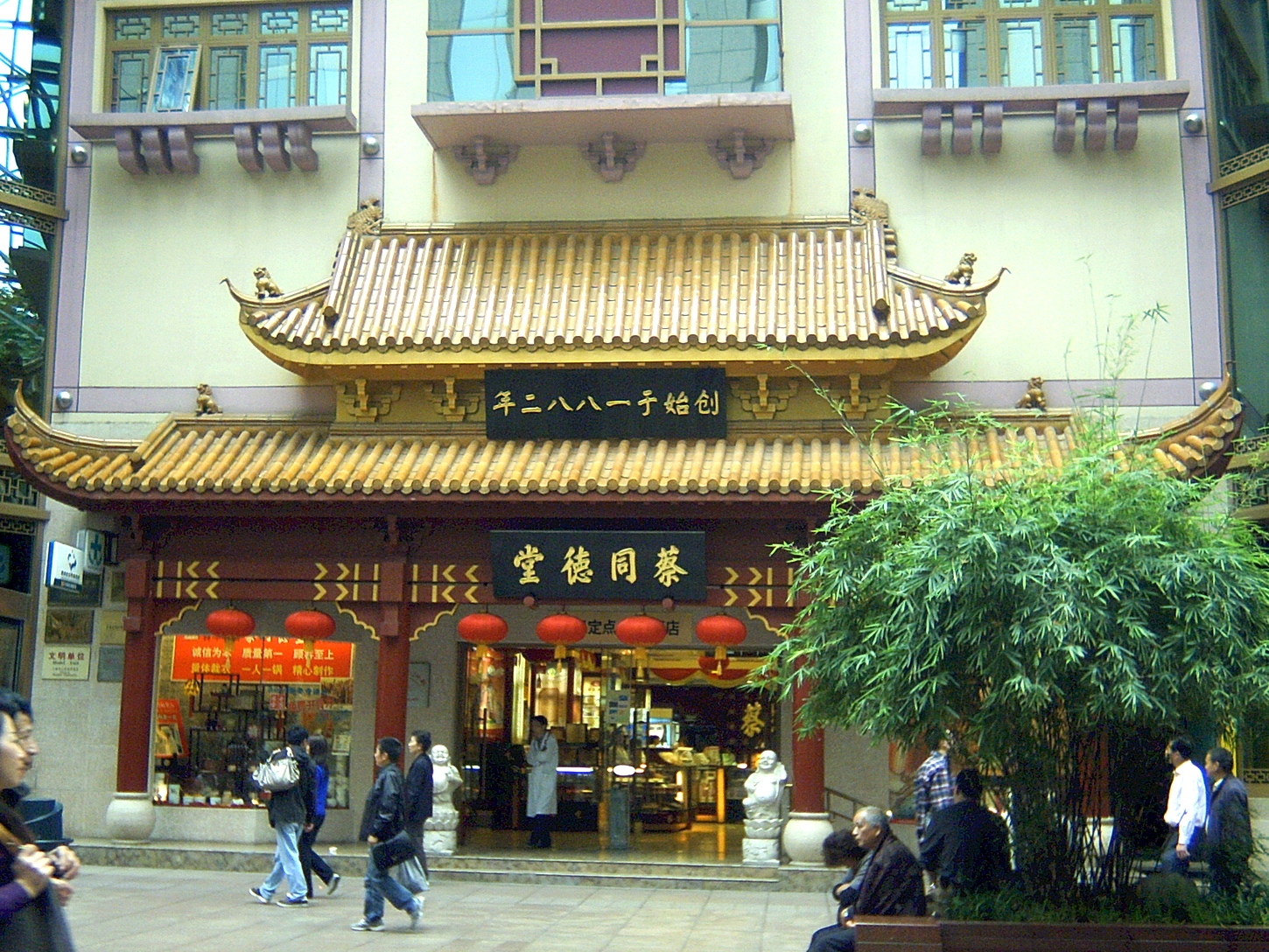 上海中华老字号蔡同德1882